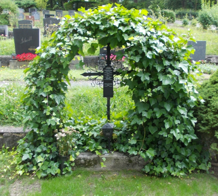 Otto Schulmeister Neustifter Friedhof (12-2-21)